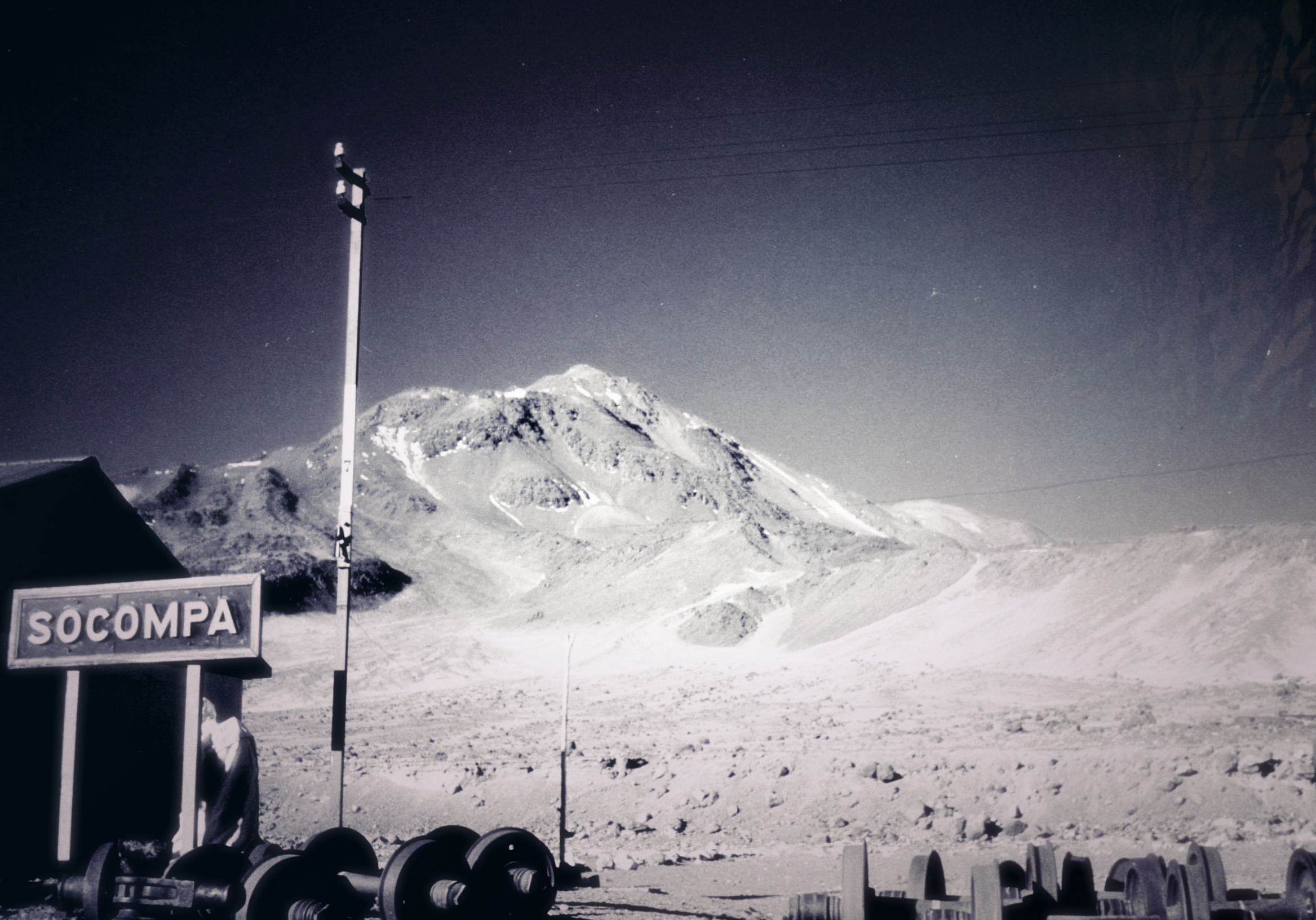 Estación Socompa, provincia de Salta, Argentina